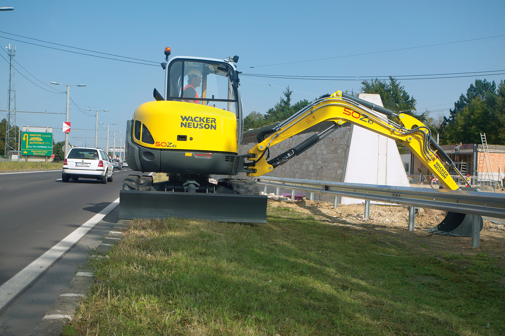 Wacker Neuson Bagger 50Z3 ein "Zero-Tail" Bagger der 5 Tonnen Klasse auf einer Straßenbaustelle